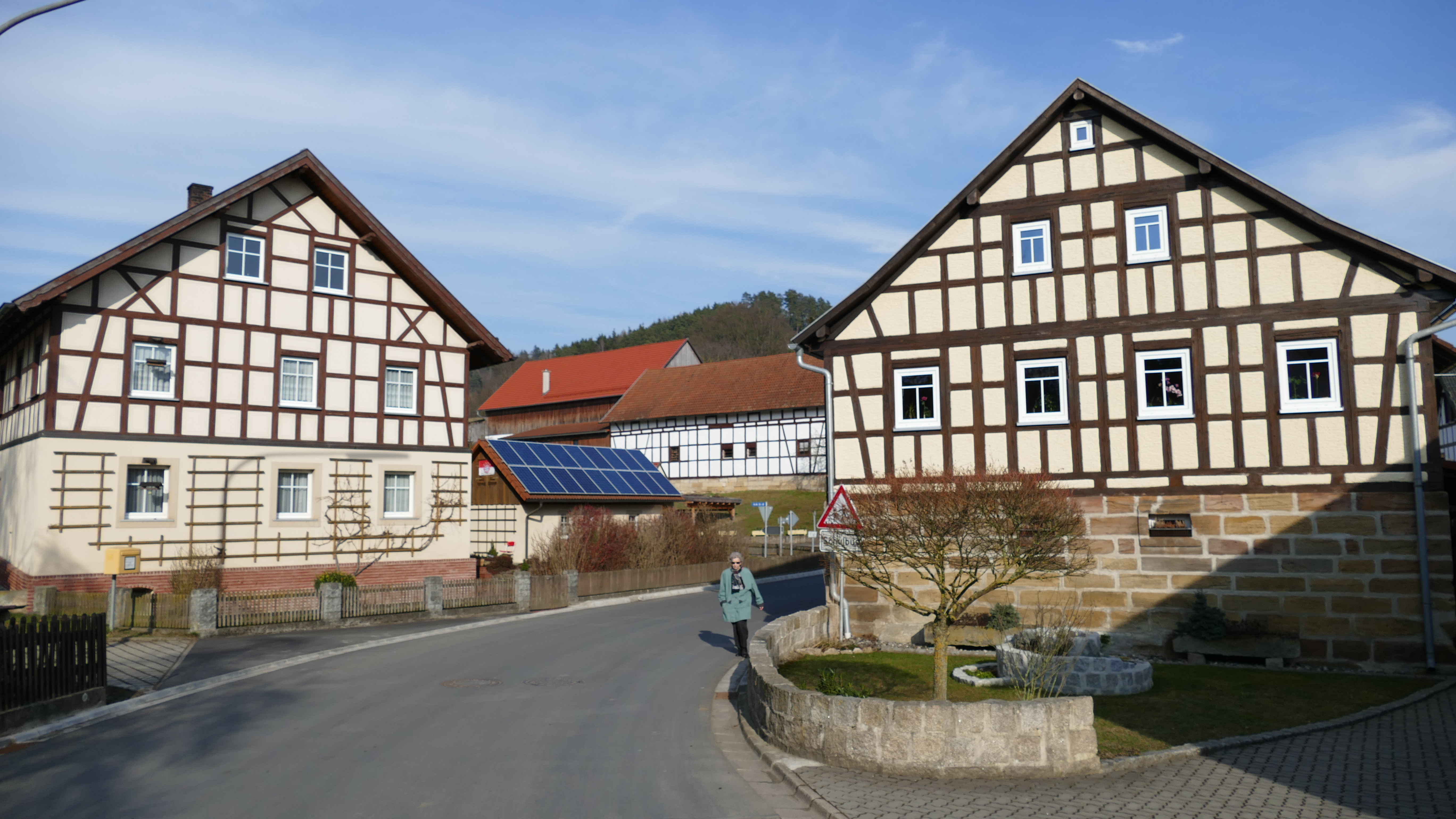 Ortskern von Schimmendorf